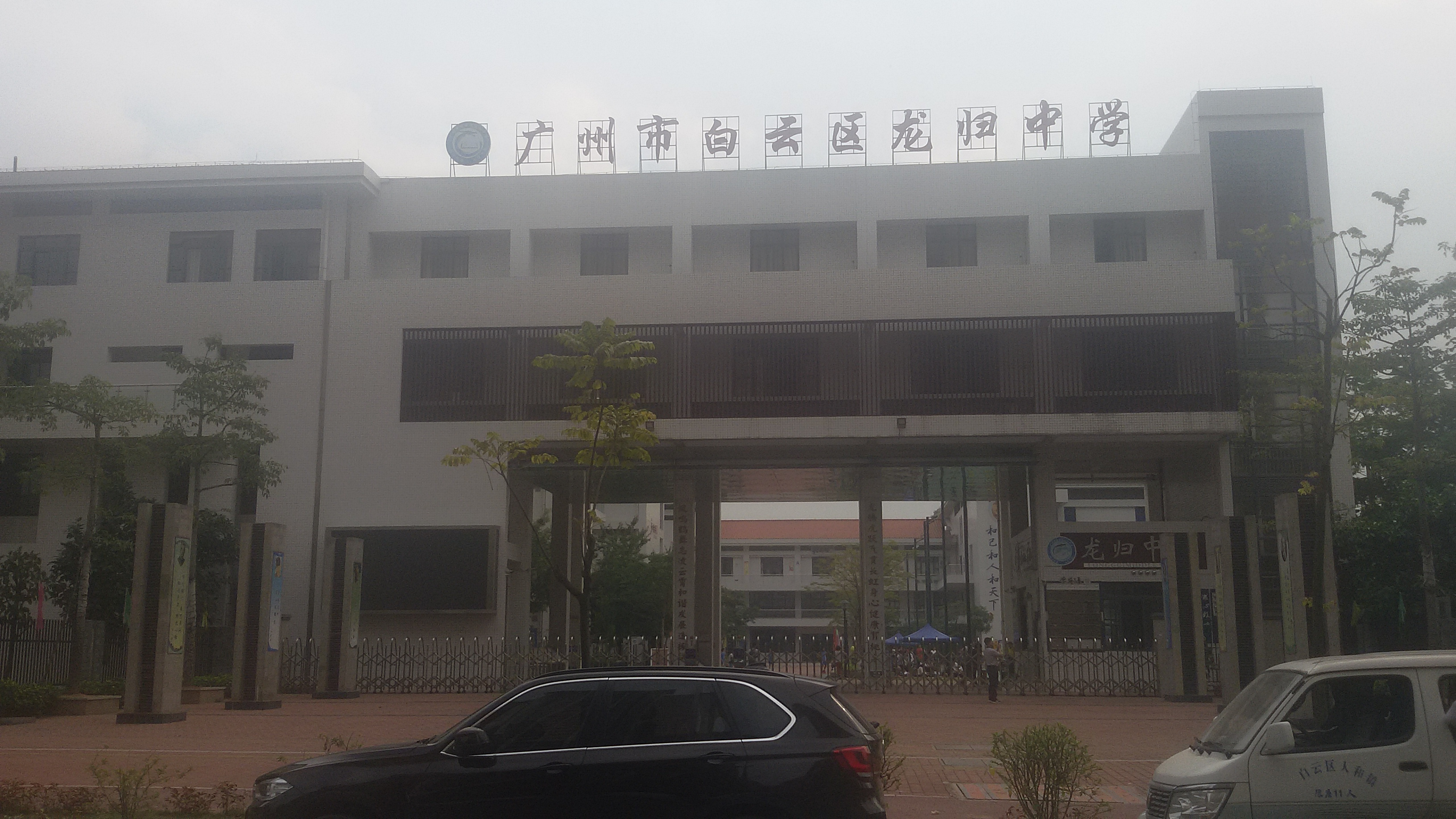 粵語: 白云区龙归中学